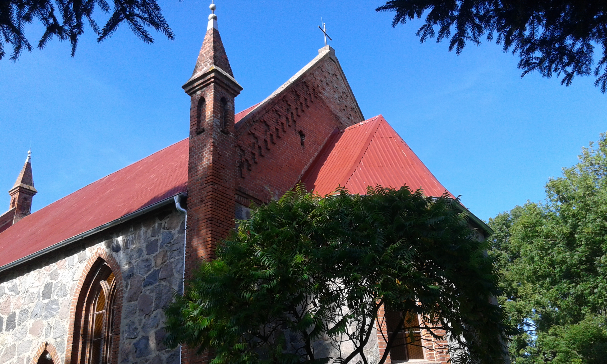 Sicko - dawny kościół ewangelicki, ob. rzymskokatolicki kościół filialny p.w. Miłosierdzia Bożego, kon. XIX